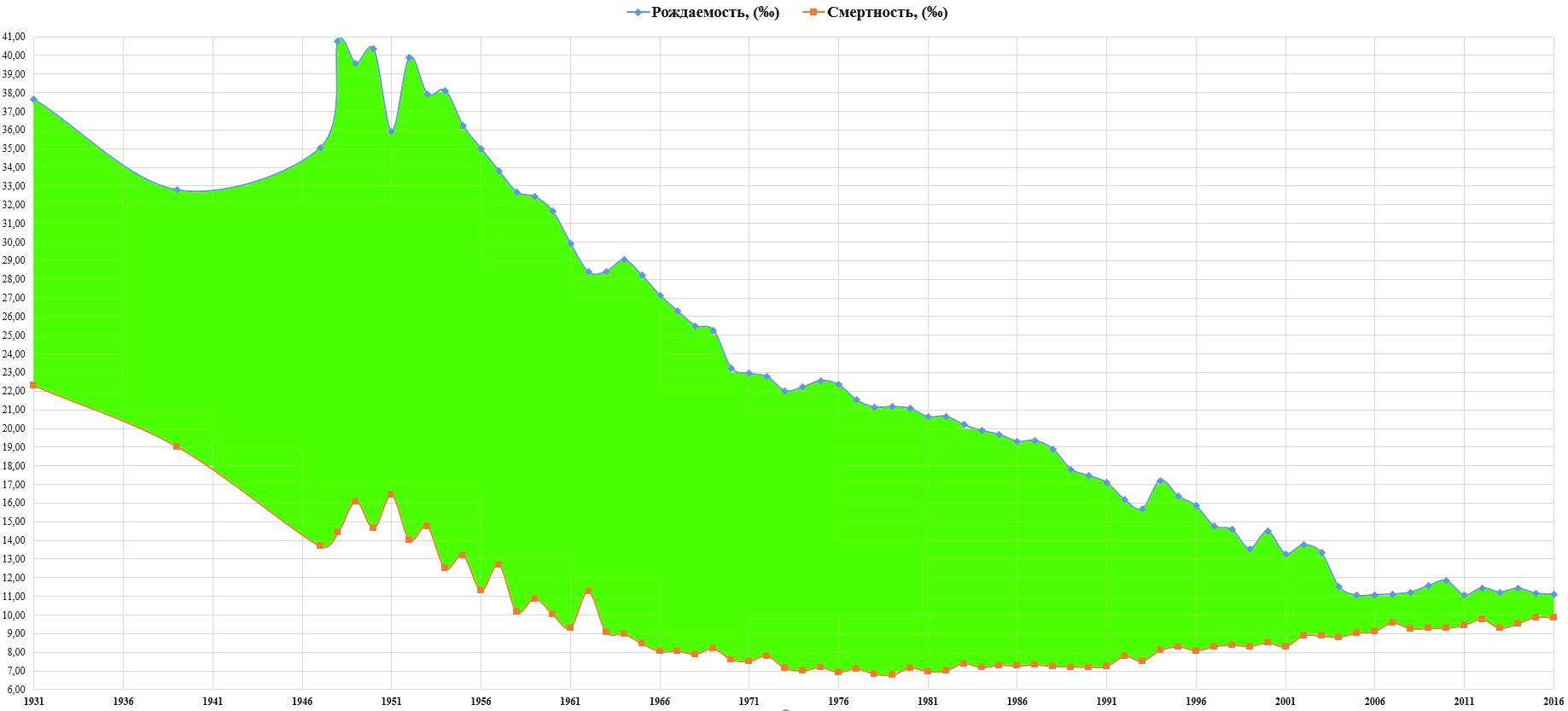 Естественное движение Македонии